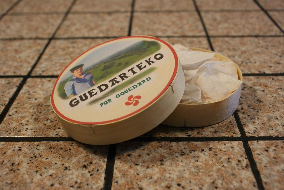 Cet emballage ne correspond pas au logo d'une marque. Il s'agit d'un visuel couramment utilisé dans plusieurs fromageries locales afin d'apporter l'aspect graphique manquant au Gouedard (ou Guedarteko) qui ne jouit que d'un commerce de détail, marquant ainsi son appartenance au Pays basque.